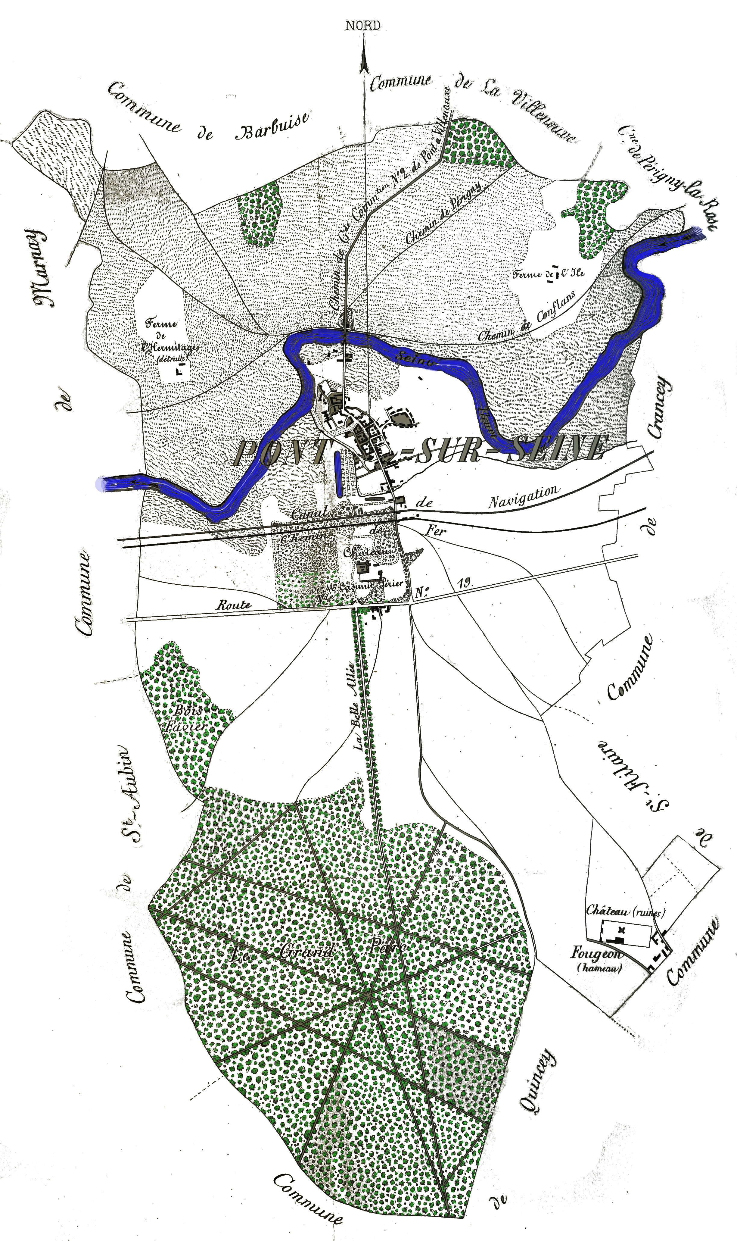 issu des collections des archives de l'Aube.